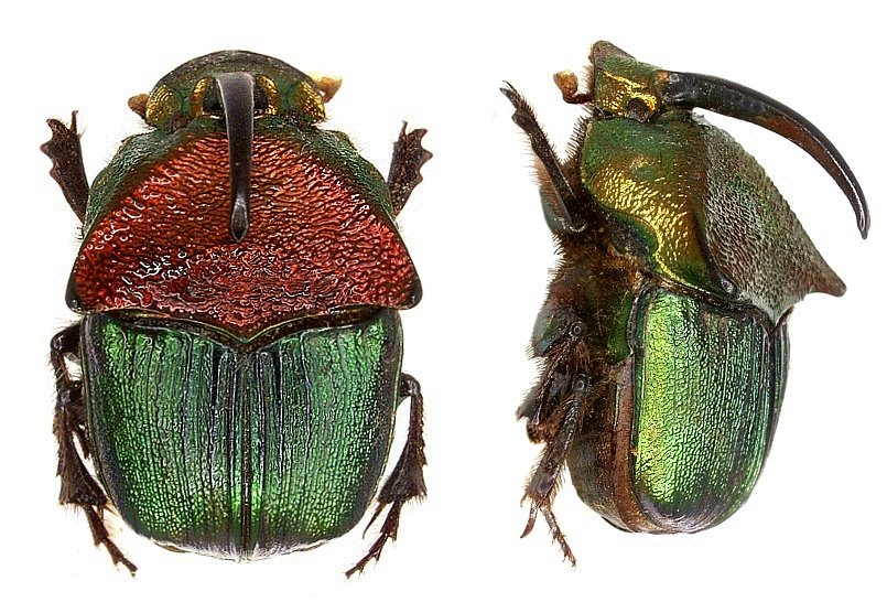 Familie: Scarabaeidae Groesse: 11-22 mm Fundort: Peru, Tingo Maria det. U.Schmidt, 2006 Photo: U.Schmidt, 2006